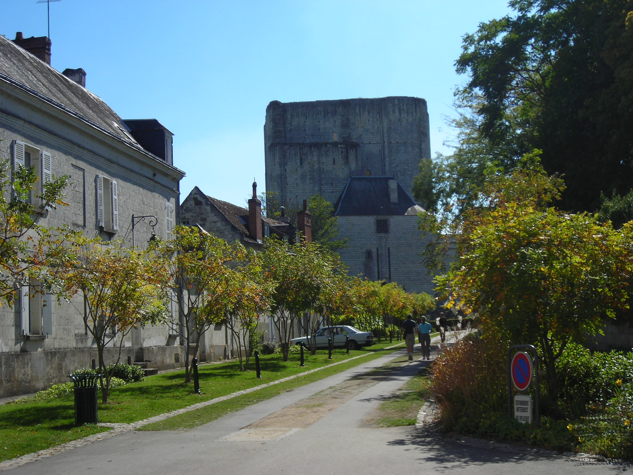 Mail du donjon de Loches